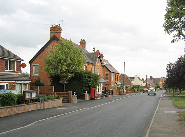 Harvington